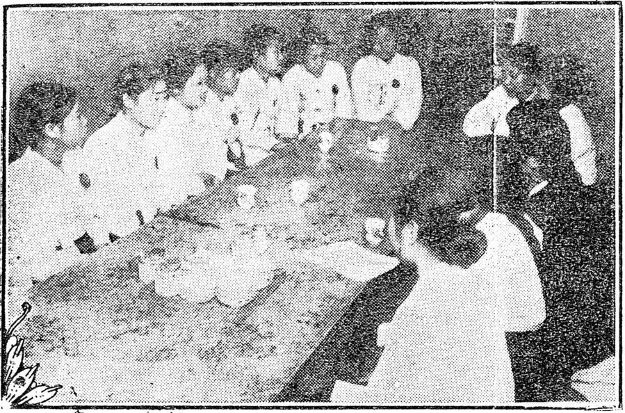 국제무산부인대회